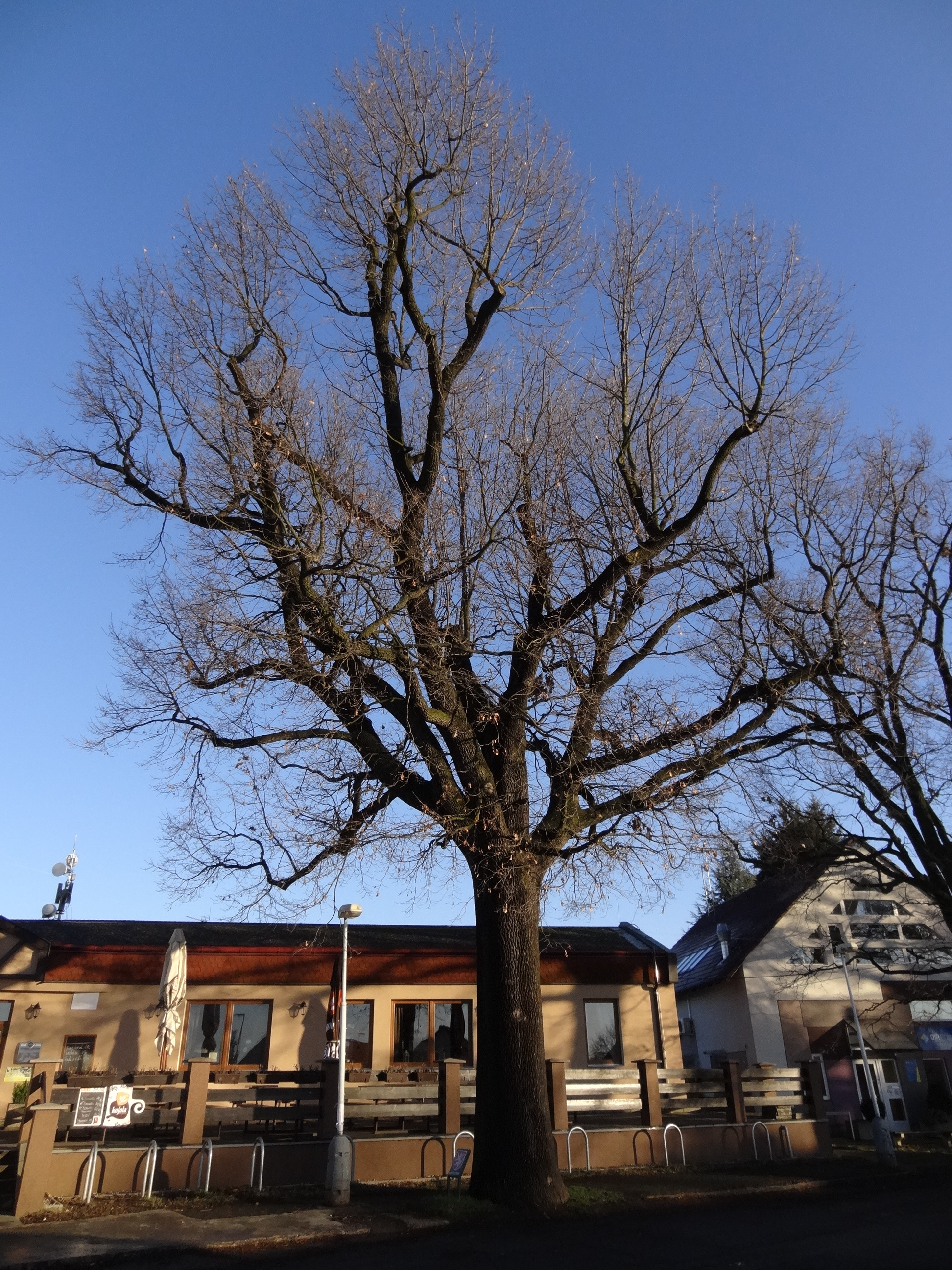 Křeslice - památný dub letní u hostince na křižovatce ulic Štychova a K Čestlicům